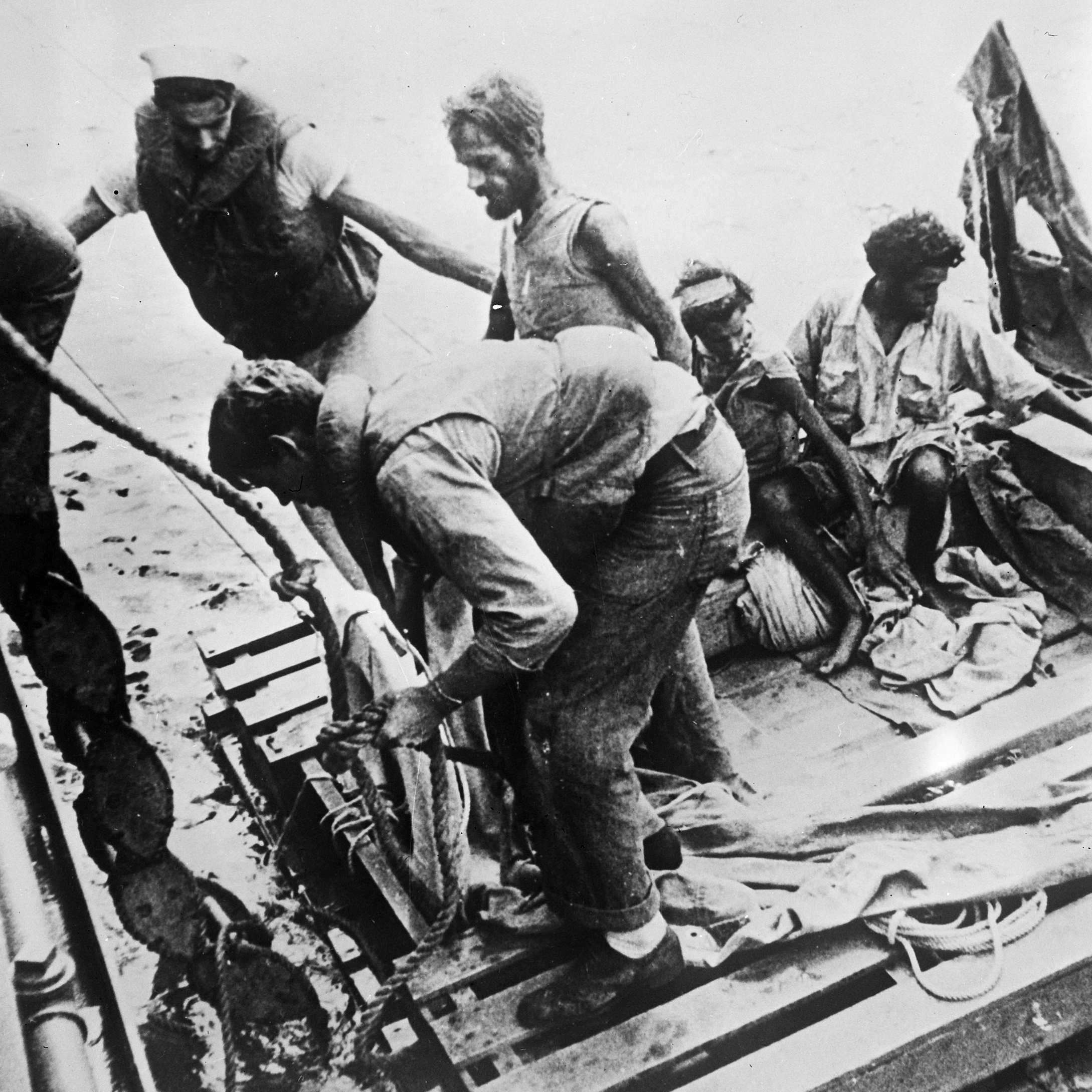 Cornelis van der Slot, Nick Hoogendam en Basil Dominic Izzi verbleven 83 dagen op een vlot, gekweld door honger en dorst, nadat hun schip de "Zaandam" op 2 november 1942 getorpedeerd was door een Duitse onderzeeer in het zuiden de Atlantische Oceaan. Hier gaan zij aan boord van een Amerikaans patrouillevaartuig 23 januari 1943